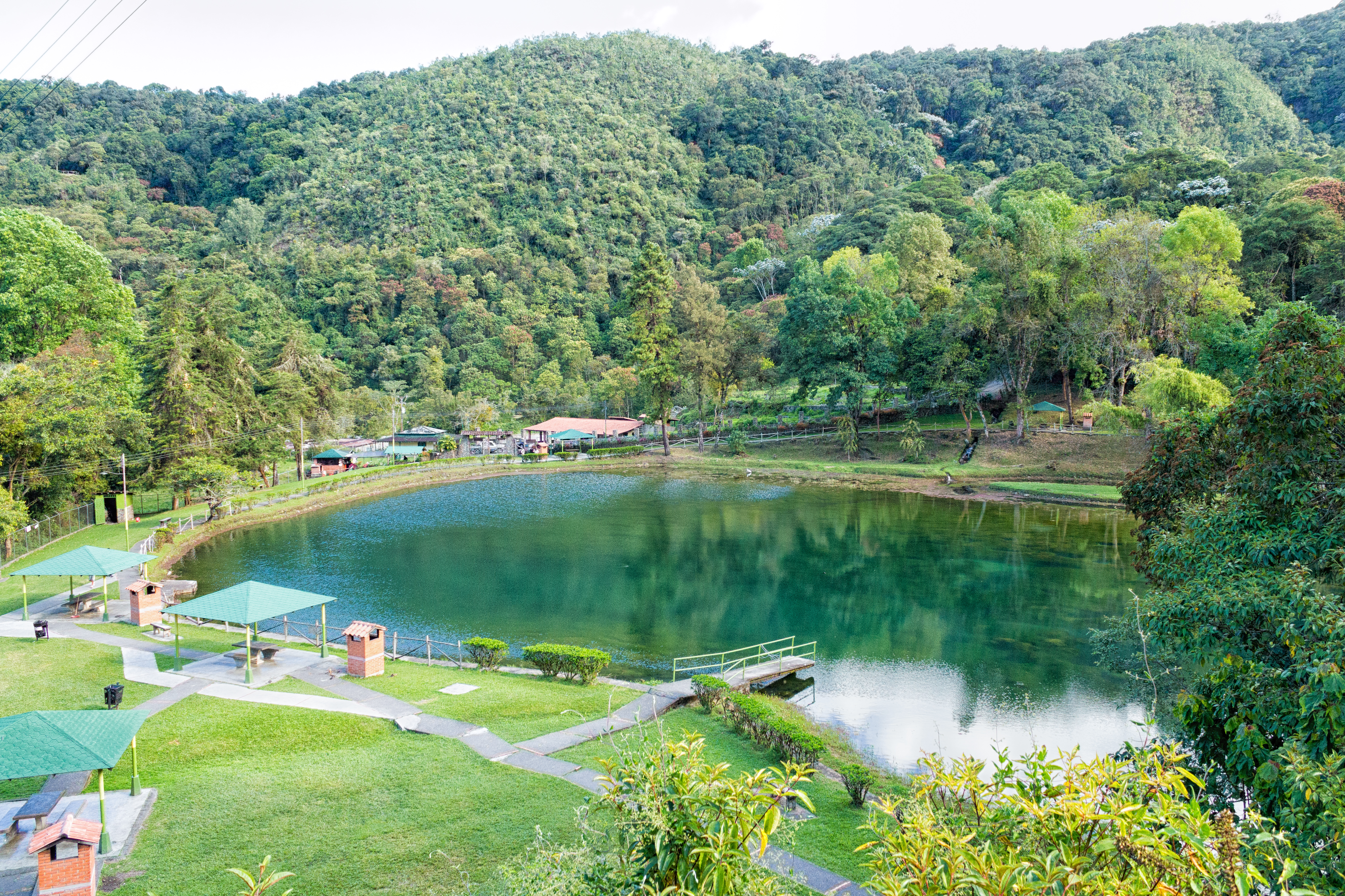 Parque Nacional Guaramacal